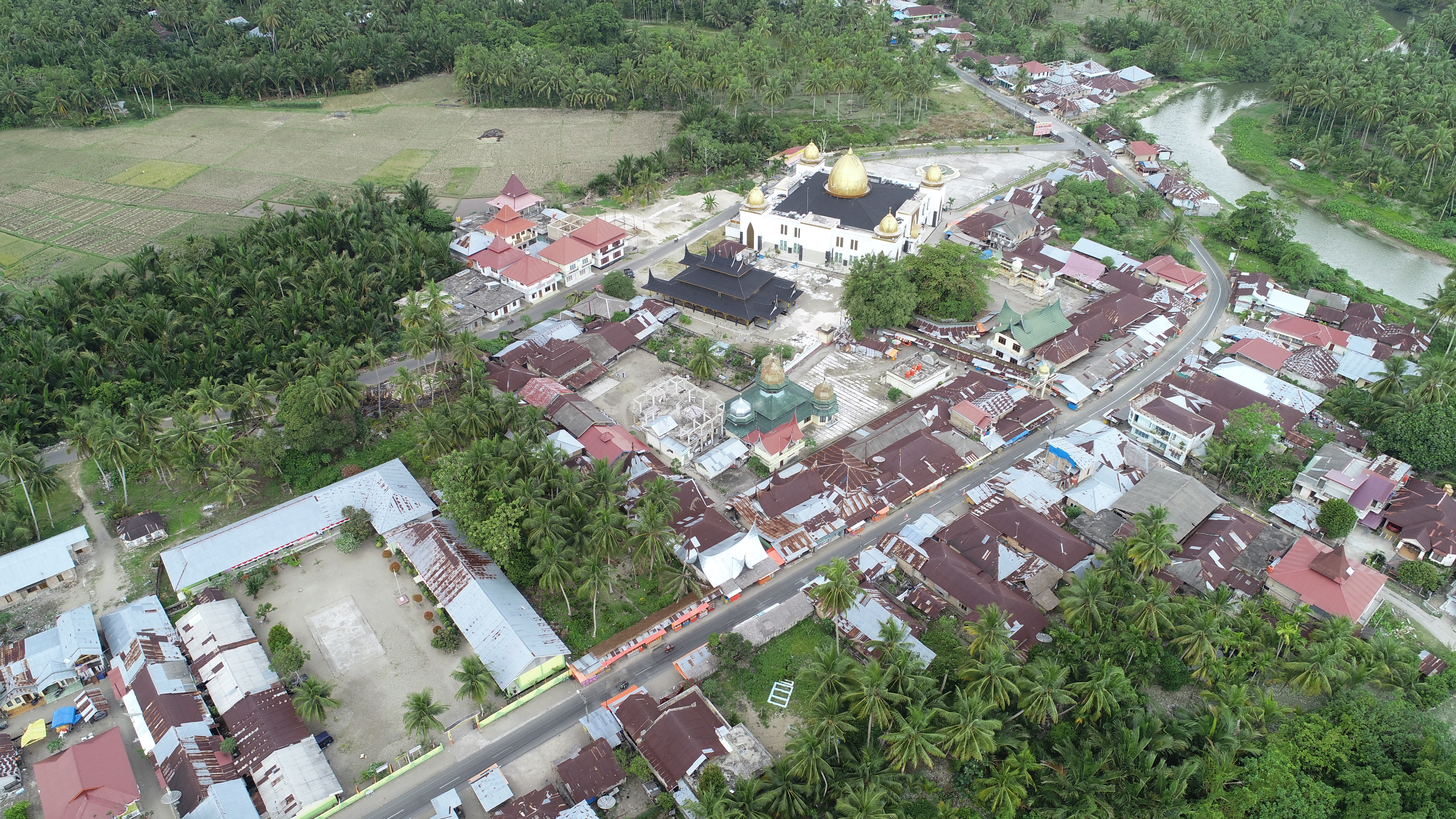 Situs Makam Syekh Burhanuddin di Padang Pariaman